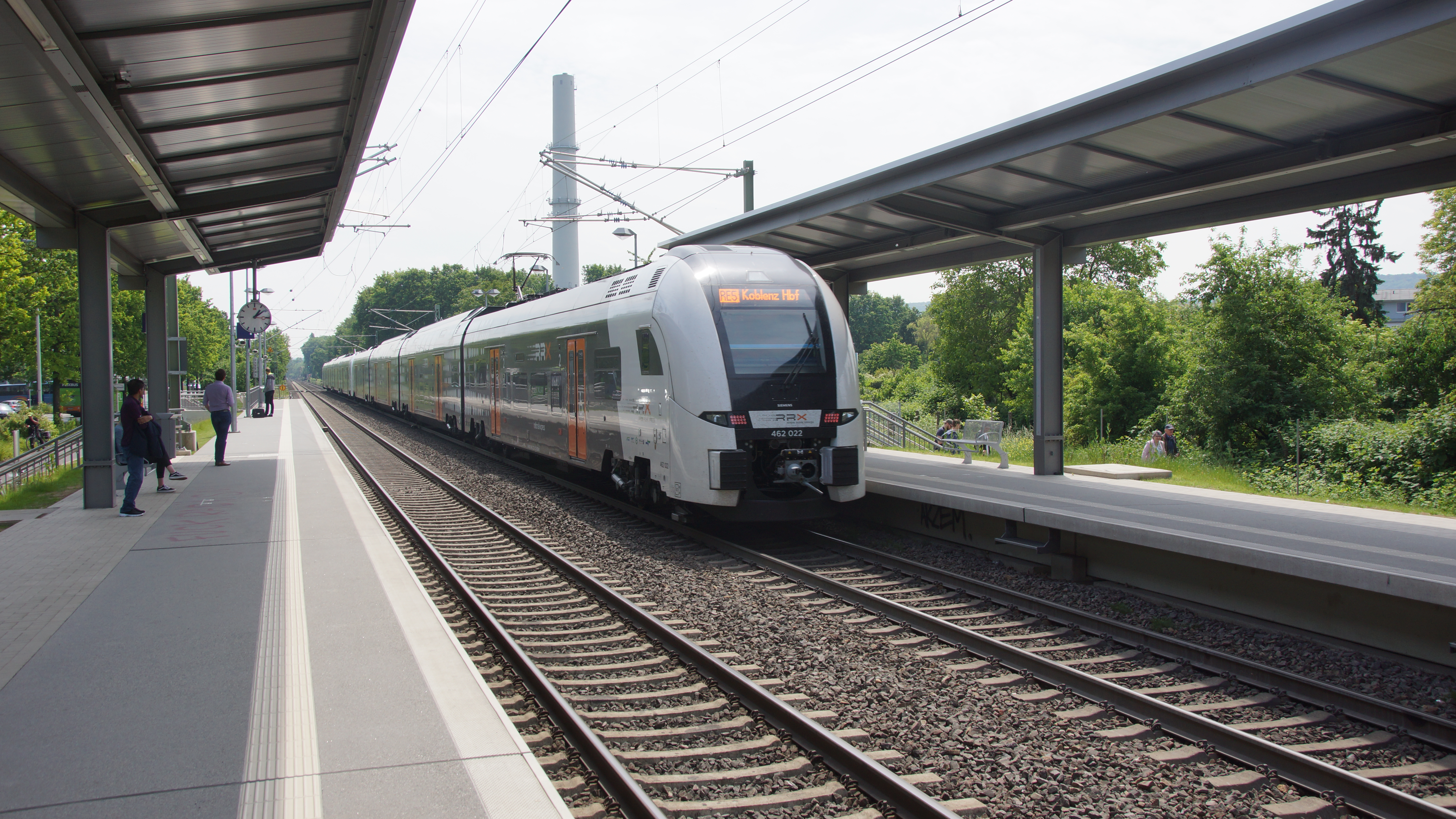 Haltepunkt Bonn UN Campus mit RRX-Zug Siemens Desiro HC des RE5 Rhein-Express